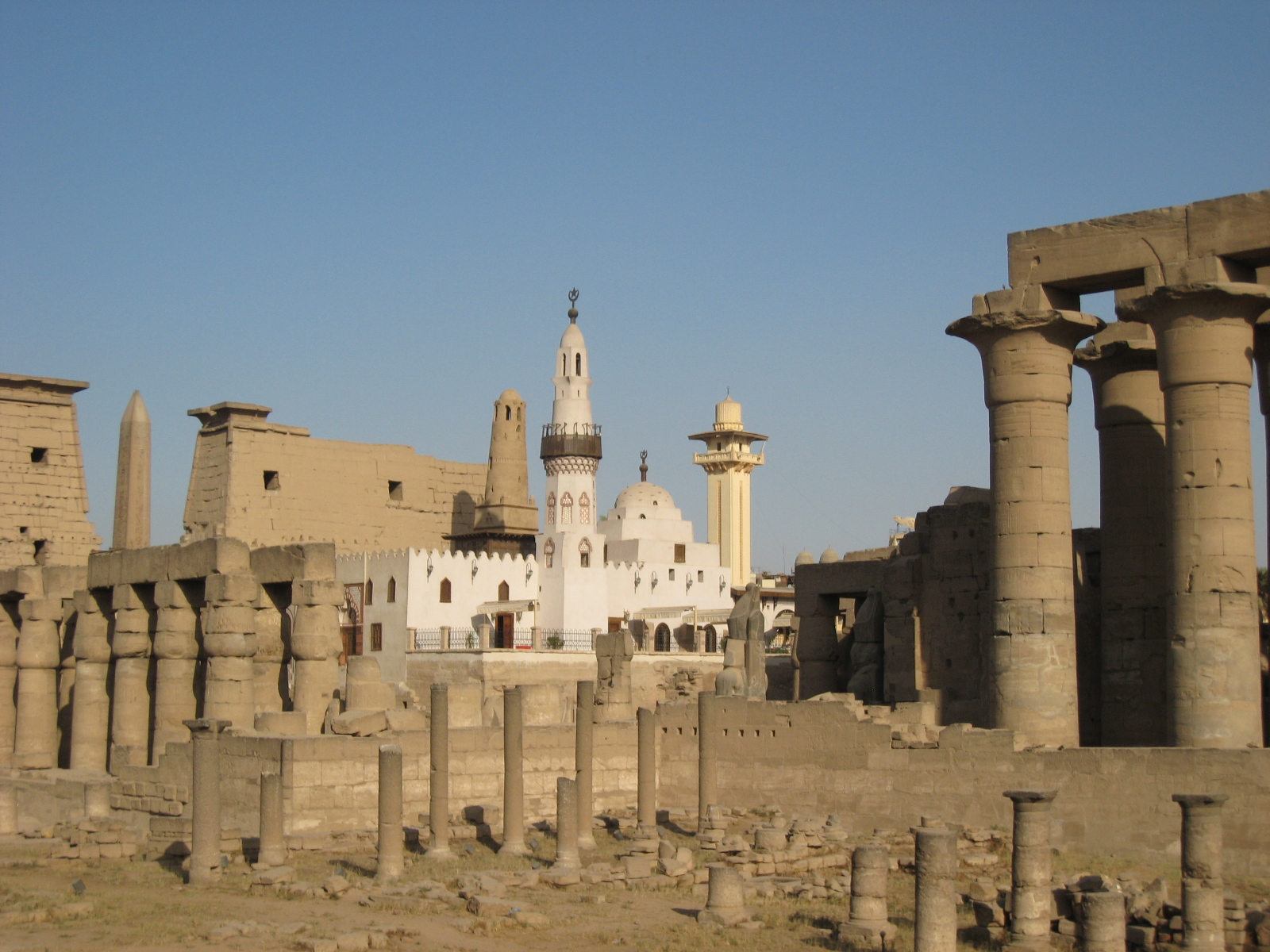 Luxor Temple IMG_6135